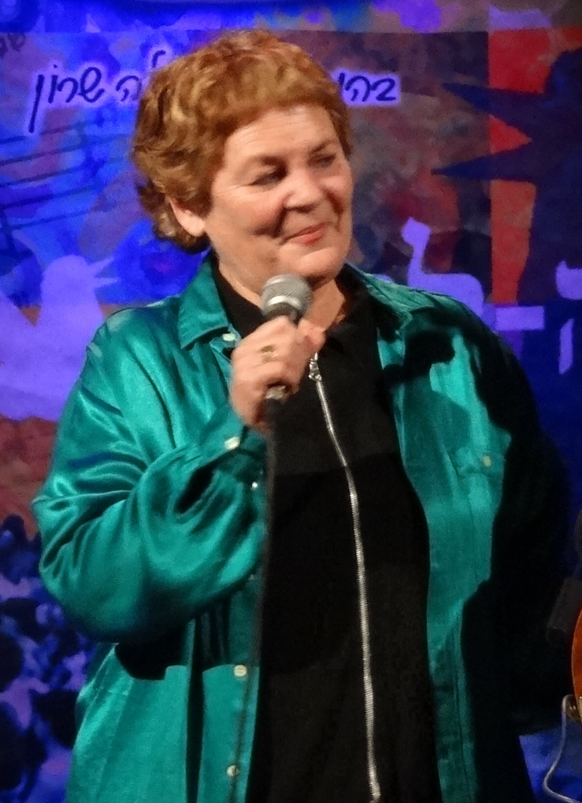 Alon Oleartchik אלון אולארצ'יק בהופעה במועדון הזמר עמק הירדן יחד עם שרלה שרון